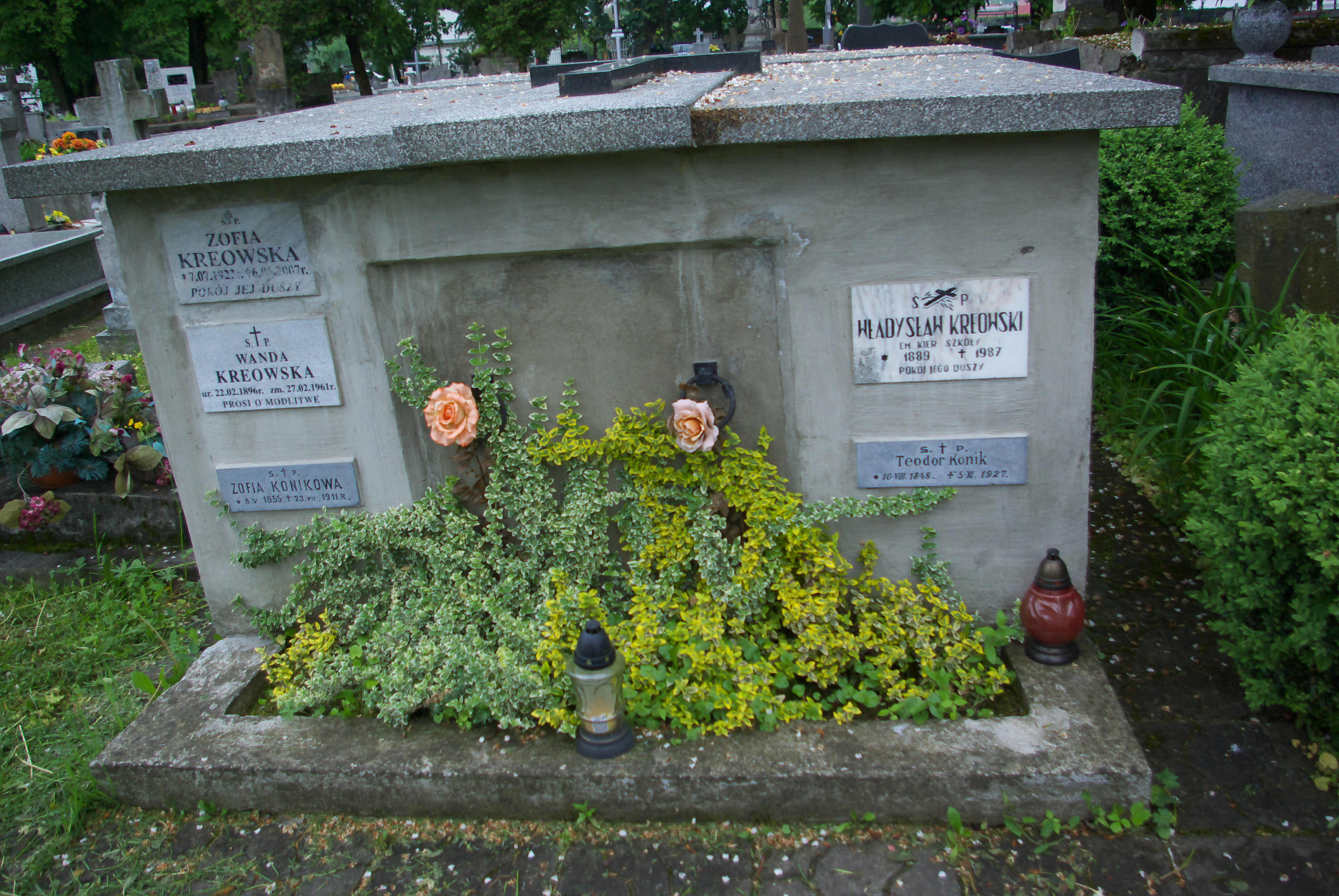 Grobowiec rodziny Kreowskich na Cmentarzu Centralnym w Sanoku.